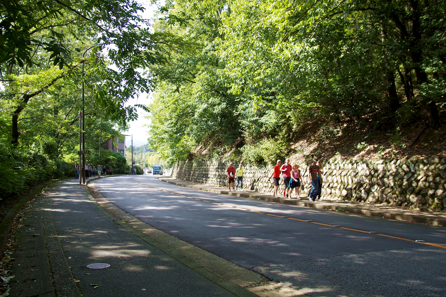 京都市北西部の観光道路「きぬかけの路」 金閣寺から龍安寺の区間で撮影